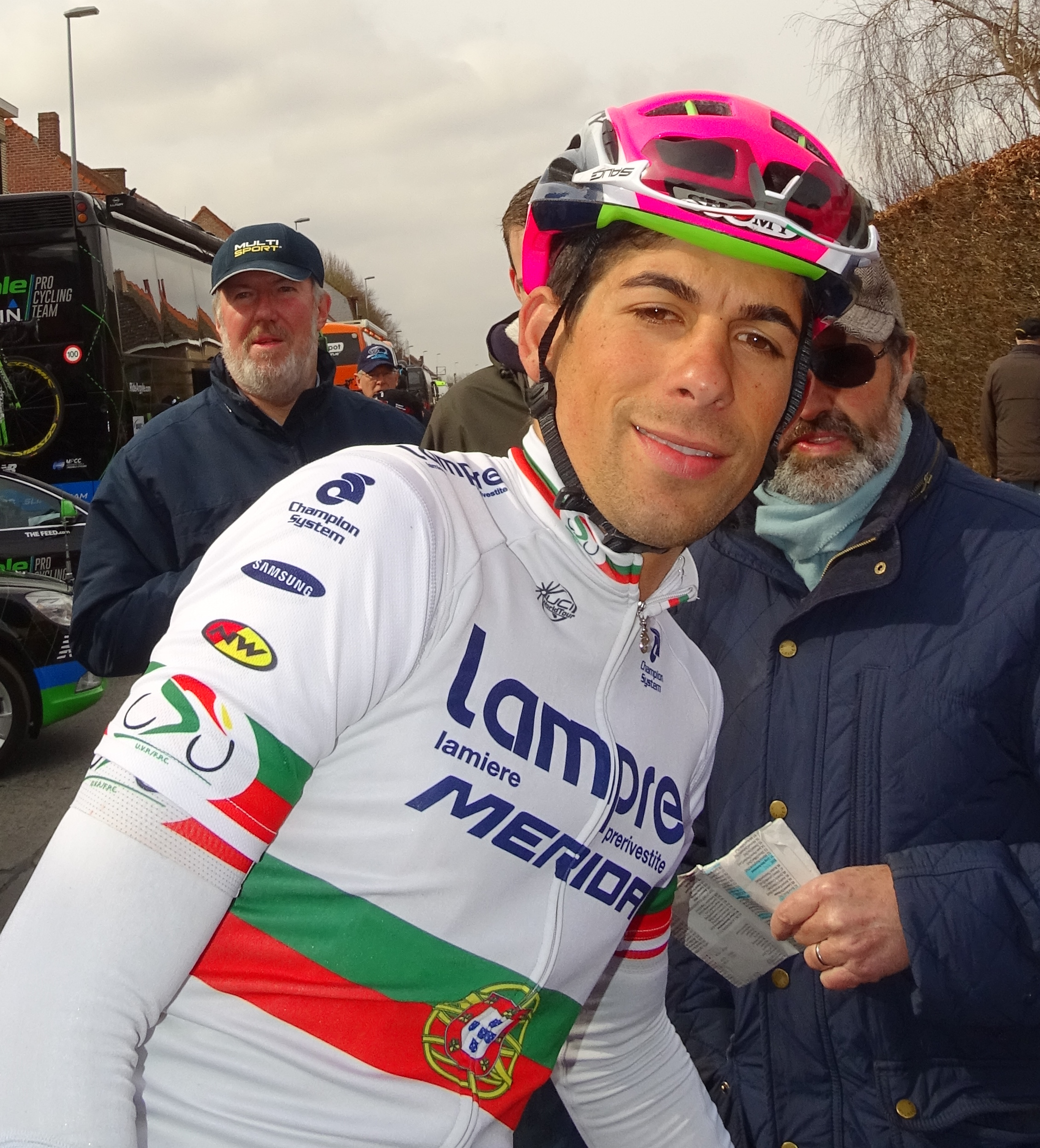 Reportage réalisé le vendredi 27 mars à l'occasion du départ et de l'arrivée du Grand Prix E3 2015 à Harelbeke, Belgique.